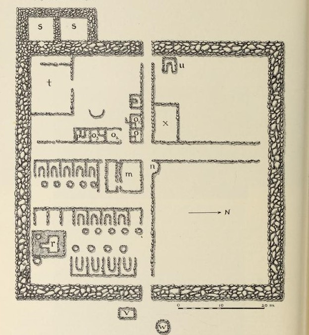 Kohortenlager C